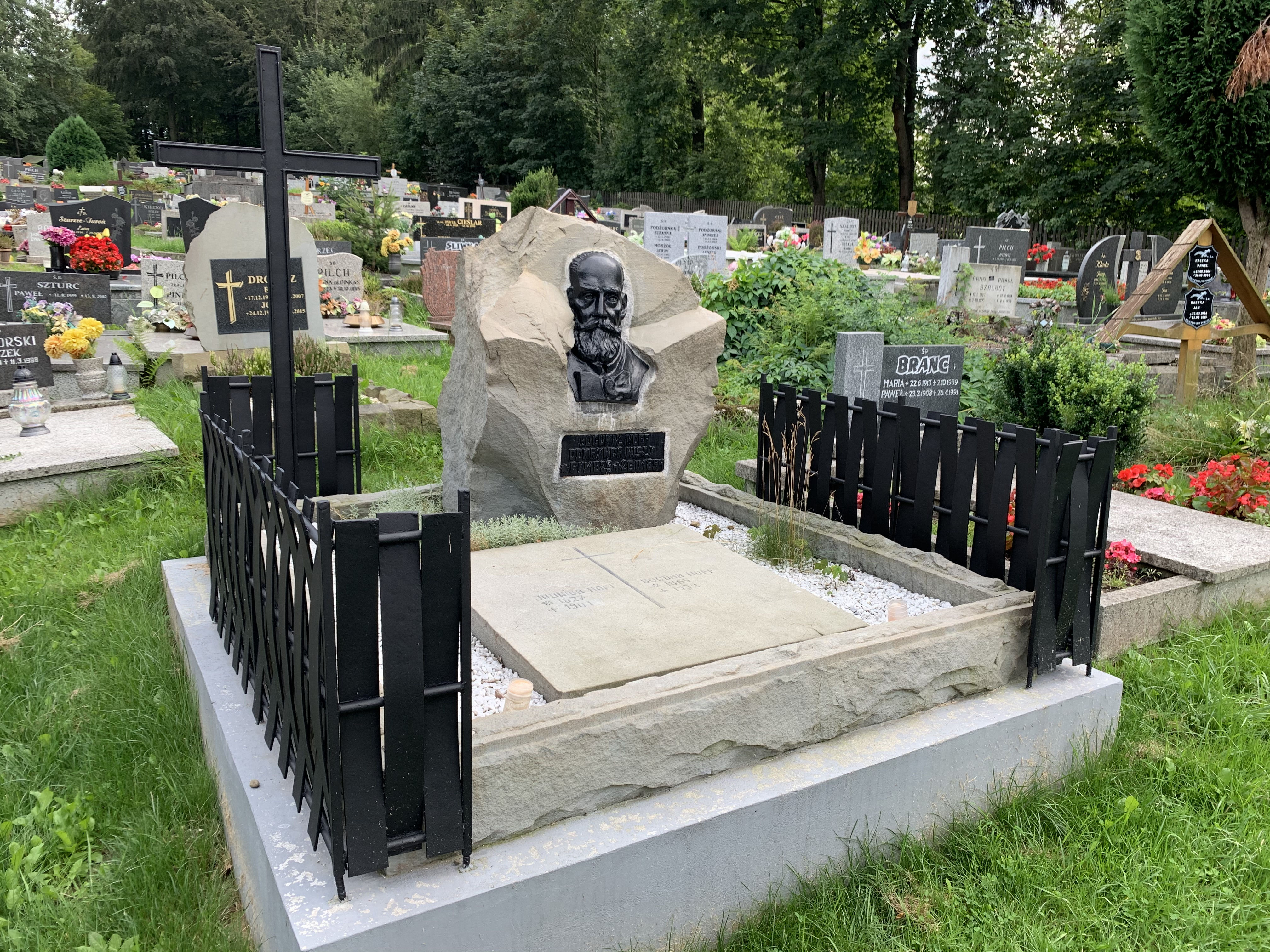 Cmentarz Na Groniczku w Wiśle - nagrobek Bogumiła Hoffa, krajoznawcy i etnografa, promującego Wisłę jako letnisko oraz Bogdana Hoffa, syna Bogumiła, legionisty, malarza oraz projektanta i budowniczego pensjonatów w Wiśle, założyciela Stowarzyszenia Miłośników Wisły